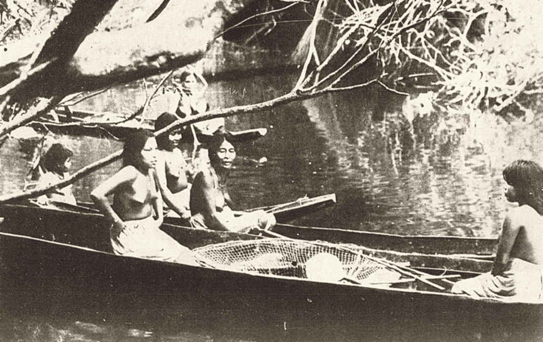 Índias da etnia Uanana em pescaria no rio Timbó, fotografadas em 1933 quando da demarcação das fronteiras entre Brasil e Colômbia.